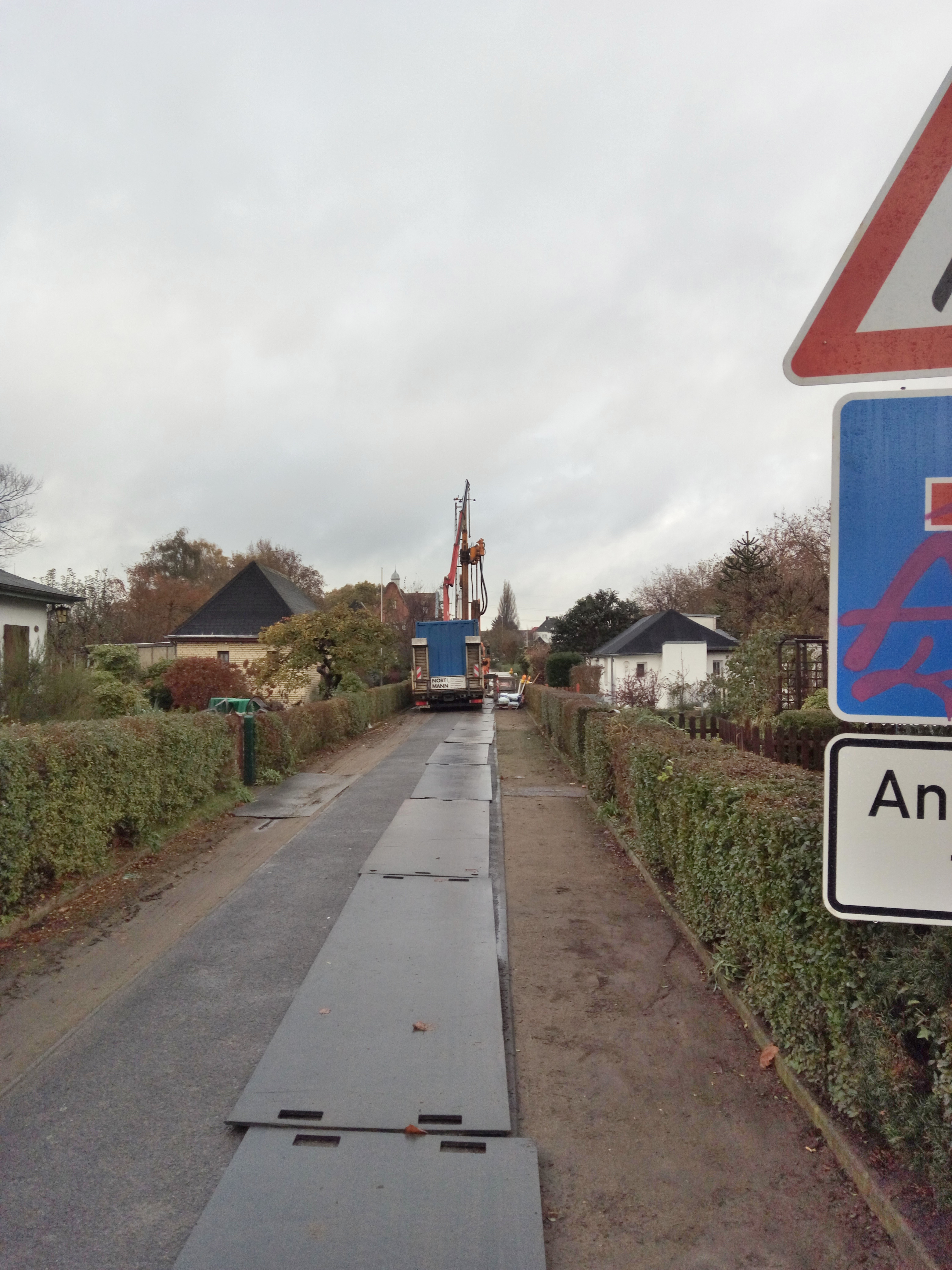 Bohrungen zum Untergrund für die neue U Bahn Linie 5 in Hamburg-Barmbek-Nord in einem Parallelweg zum Rübenkamp.